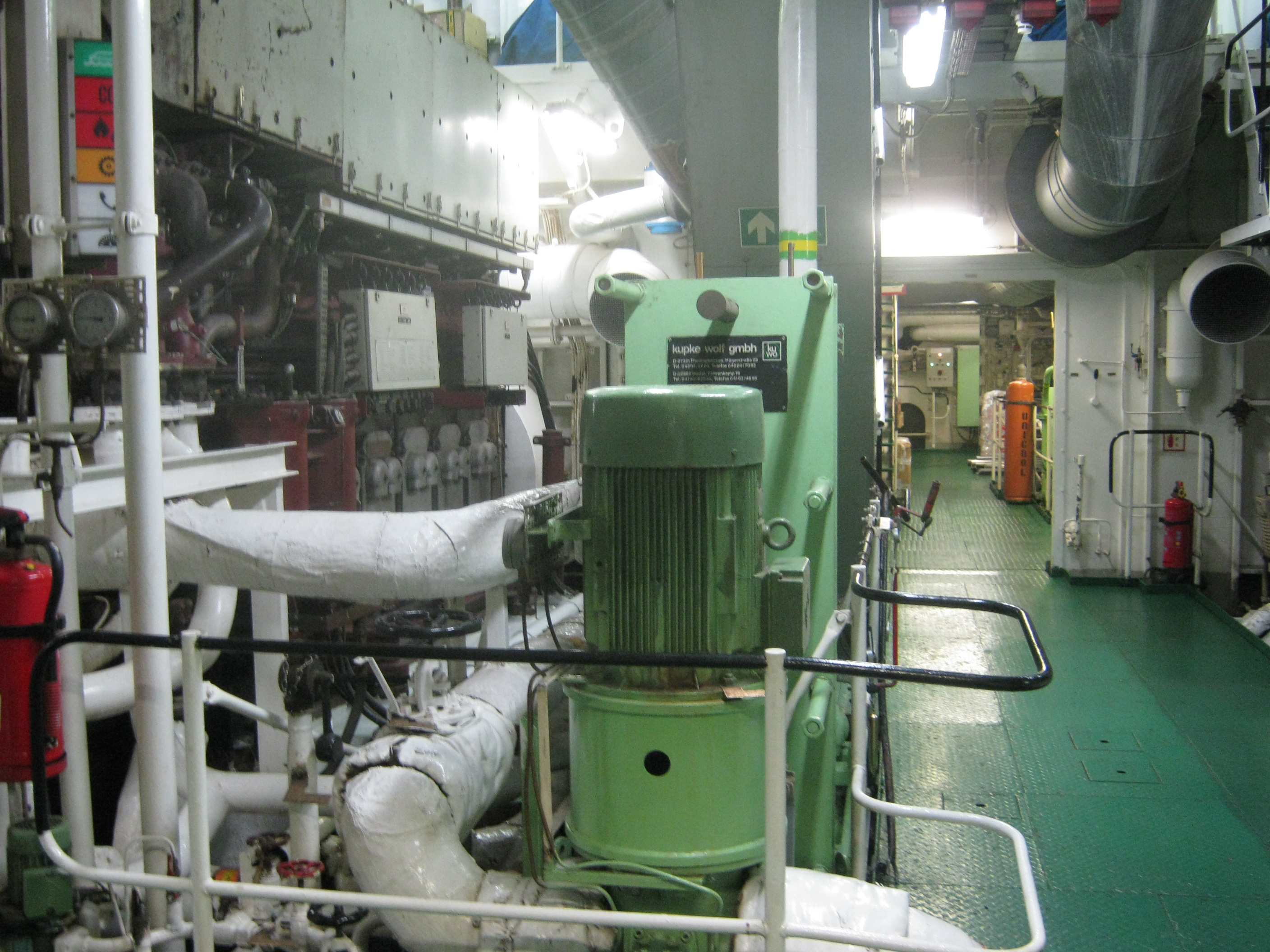 Deck 1 von Motorschiff Deutschland (1998), Hauptgang des Maschinenraums